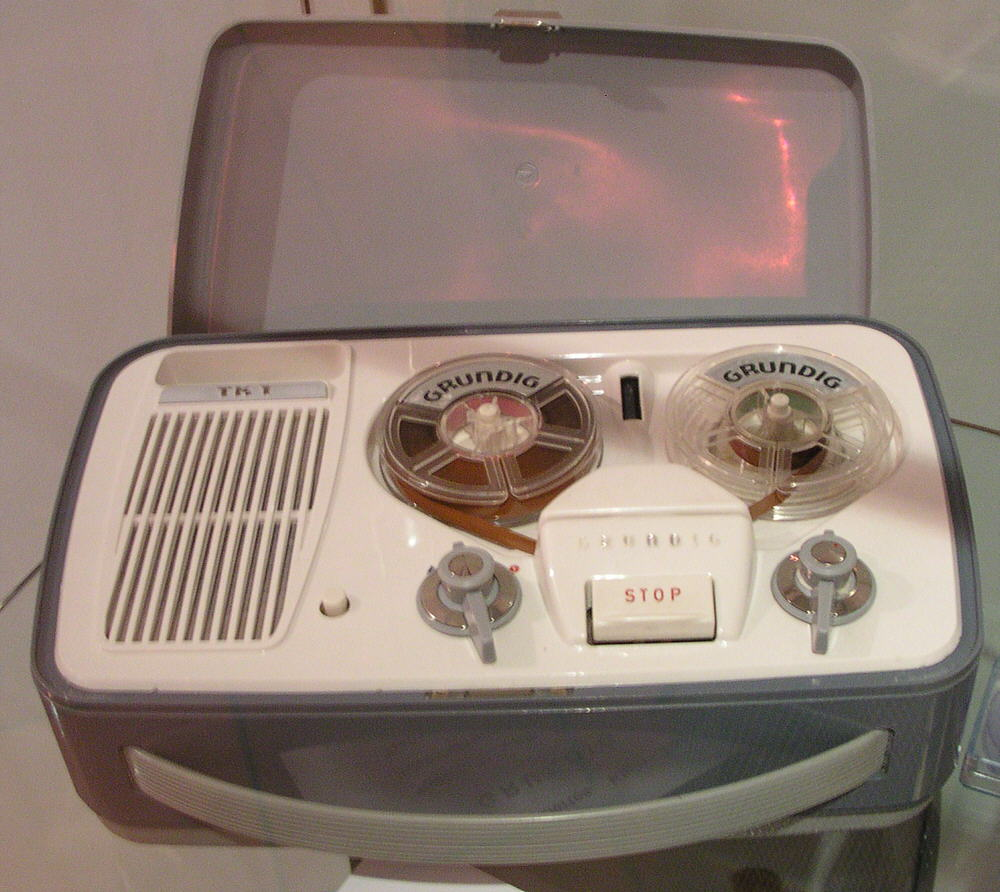 Grundig TK 1, Baujahr 1957, 8cm-Spulen, 2 Spuren, 1 Röhre zur Aussteuerungsanzeige, transistorgeregelter Gleichstrommotor, mittlere Bandgeschwindigkeit 9,5 cm/s, Baujahre 1960-1962, damaliger Preis 265 DM